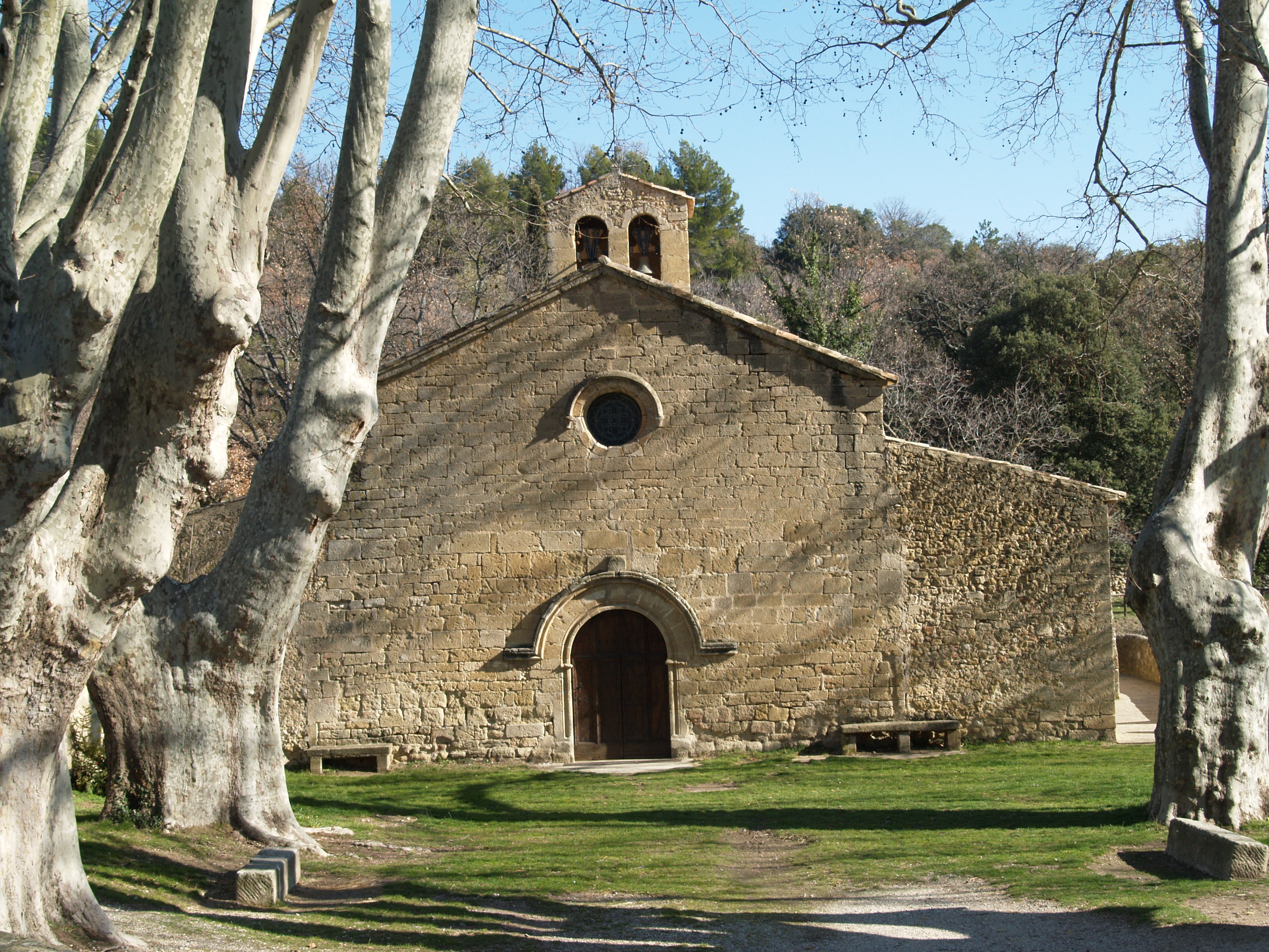 eglise Saint Barthélemy - Vaugines